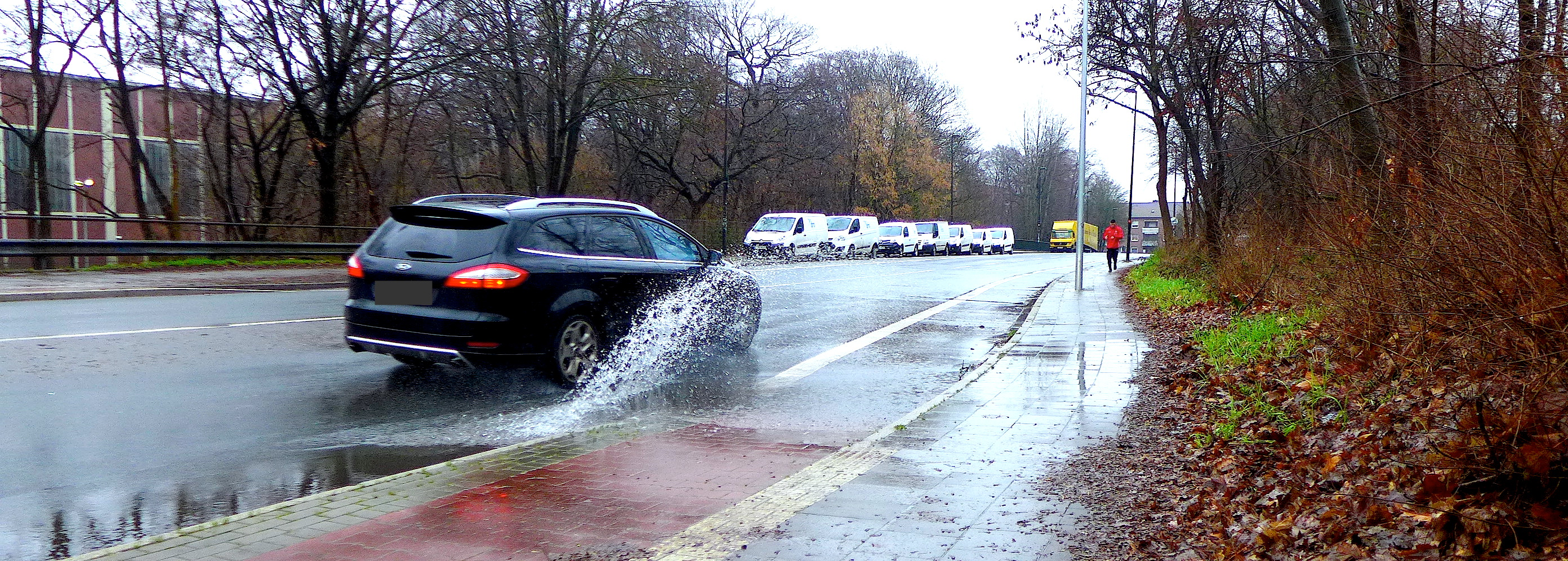 Улица Ам Буххольцер Буш в Бенрате (Дюссельдорф).